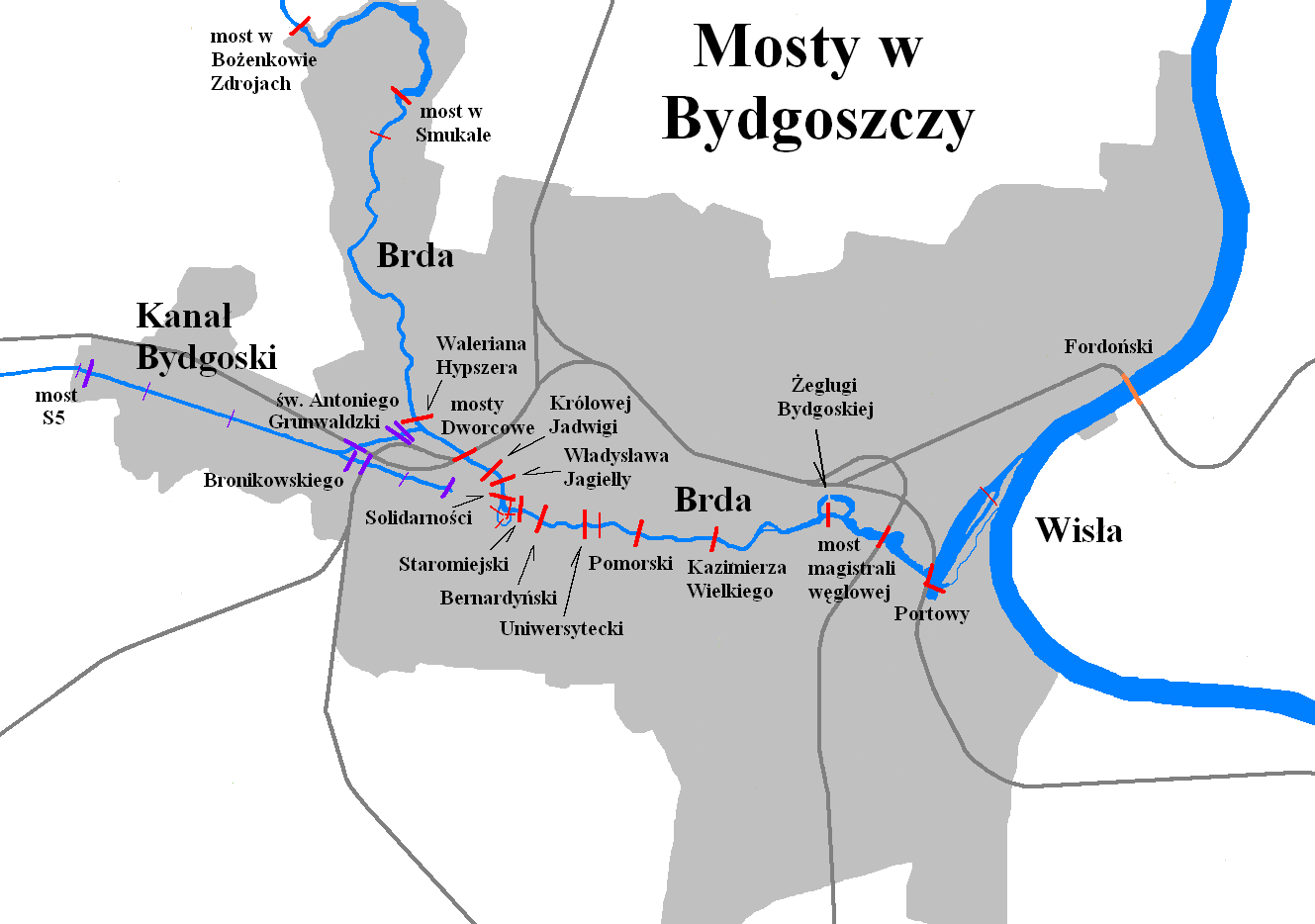 Mapa rozmieszczenia głównych mostów nad ciekami wodnymi w Bydgoszczy